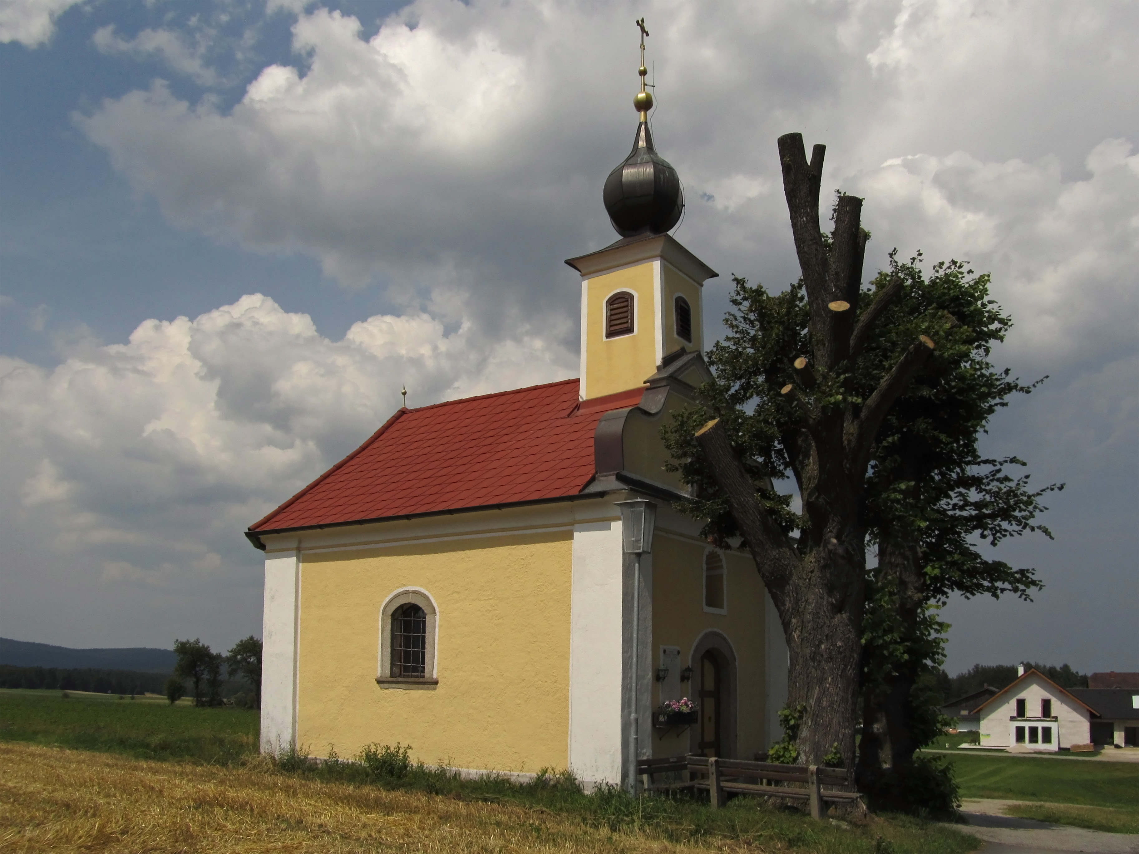 Die Votivkapelle wurde von 1744 bis 1745 erbaut. Im Inneren befindet sich eine Kopie der Gnadenstatue Maria von Altötting.